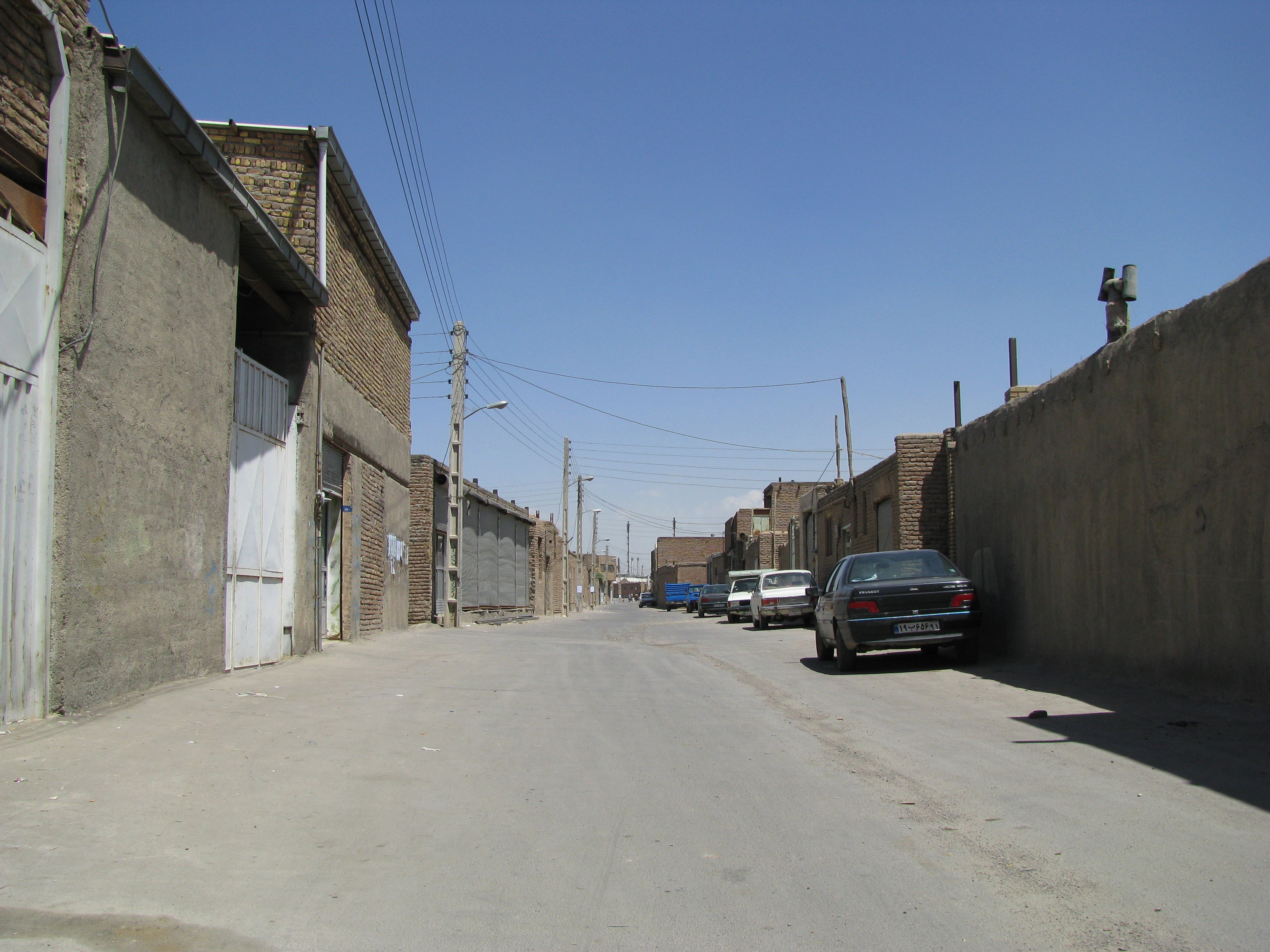 راه شوش در کوجوار یکی از محلات بزرگ